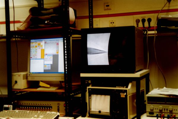 Patch-clamp установка 1установка для patch-clamp ооцитов, cell-attached mode